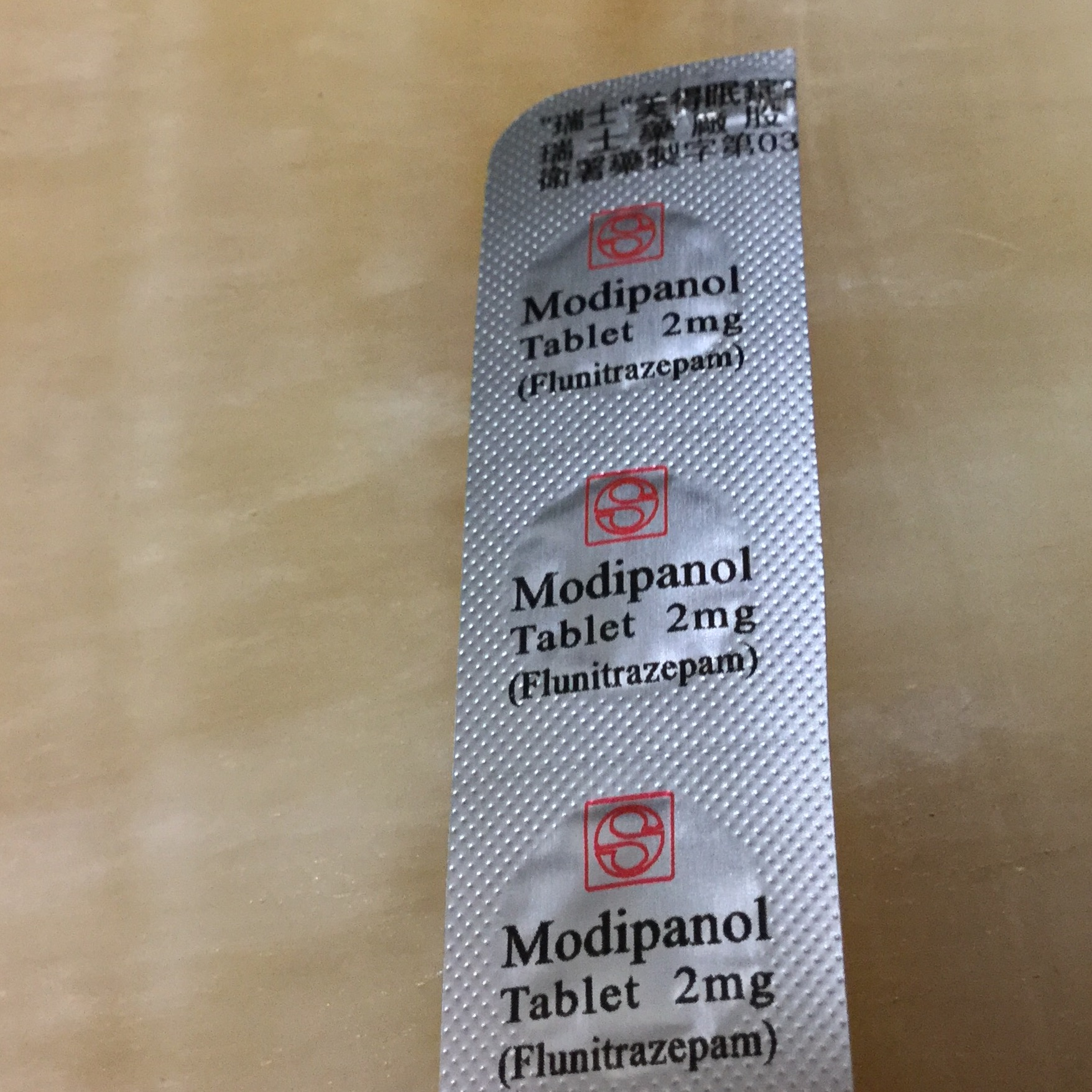 治療睡眠的藥物，含有 Flunittrszoprm